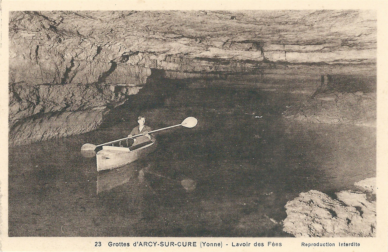 Grande grotte, site d'Arcy-sur-Cure, Yonne, Bourgogne, France. Le "lac des Fées", une des petites étendues d'eau dans la grotte. Carte postale, vers 1937 (et avant 1939)